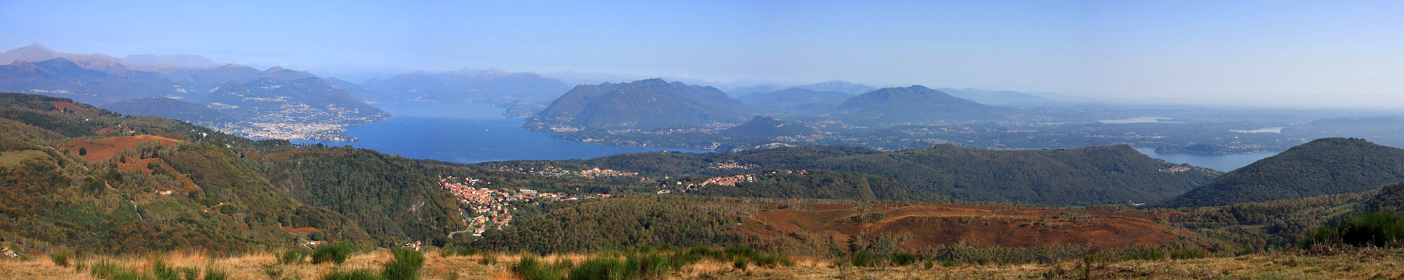 Panorama sul Lago Maggiore dalla cima del Monte Falò (1081 m)